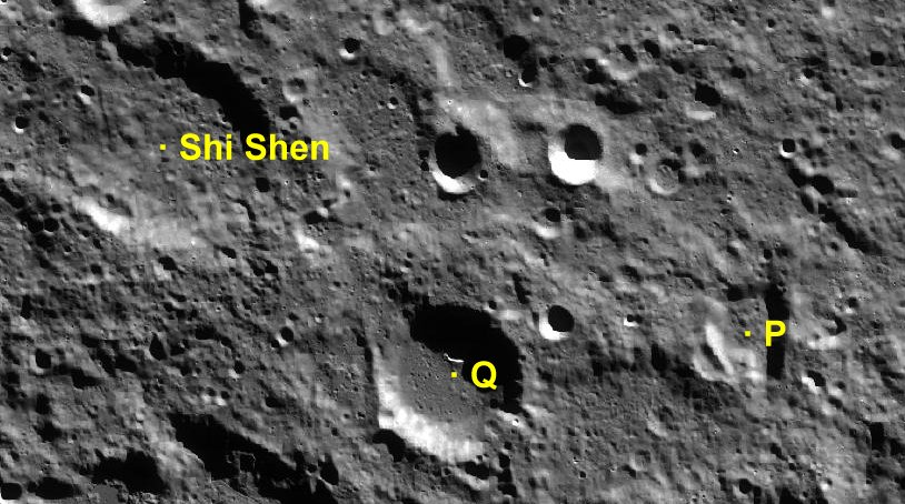 Cráter lunar Shi Shen. Cráteres satélite. (Imagen LRO)